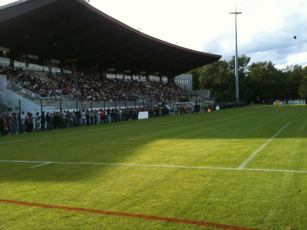 Stade de la Source - Tribune (match Orléans - Quevilly du 5 août 2011)